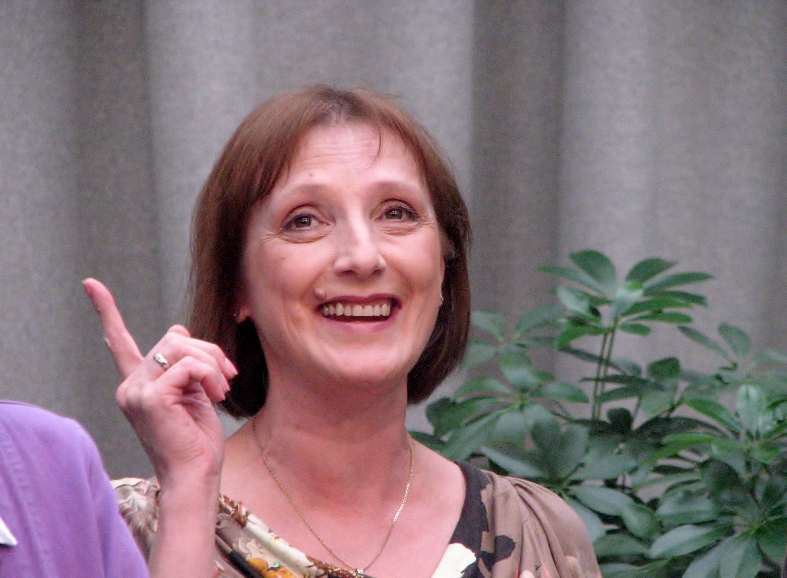 Kaie Kõrb autogrammitunnis Estonia talveaias